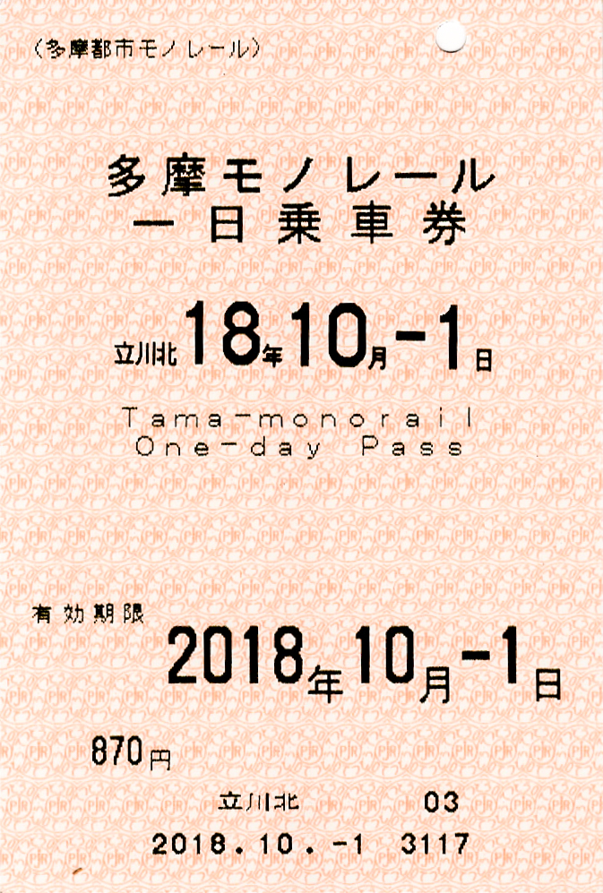 多摩都市モノレール一日乗車券